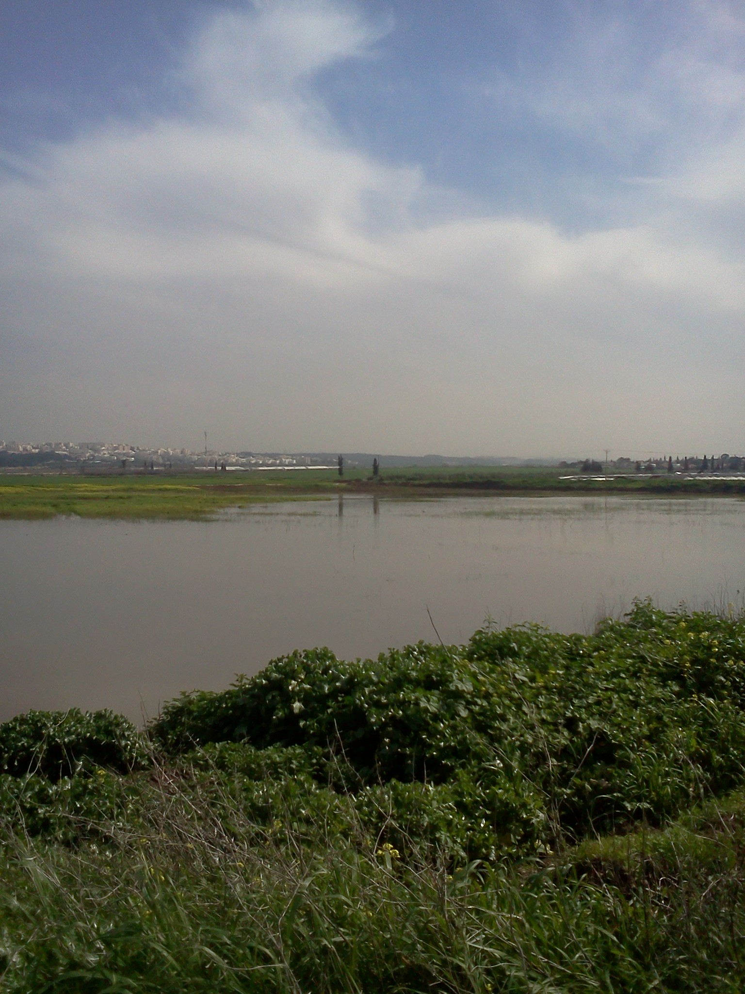 מאגר מים צפונית למושב נחלים